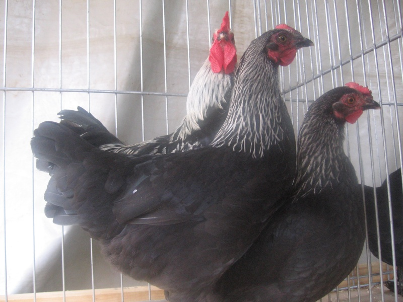 poules noires à camails argentés naines